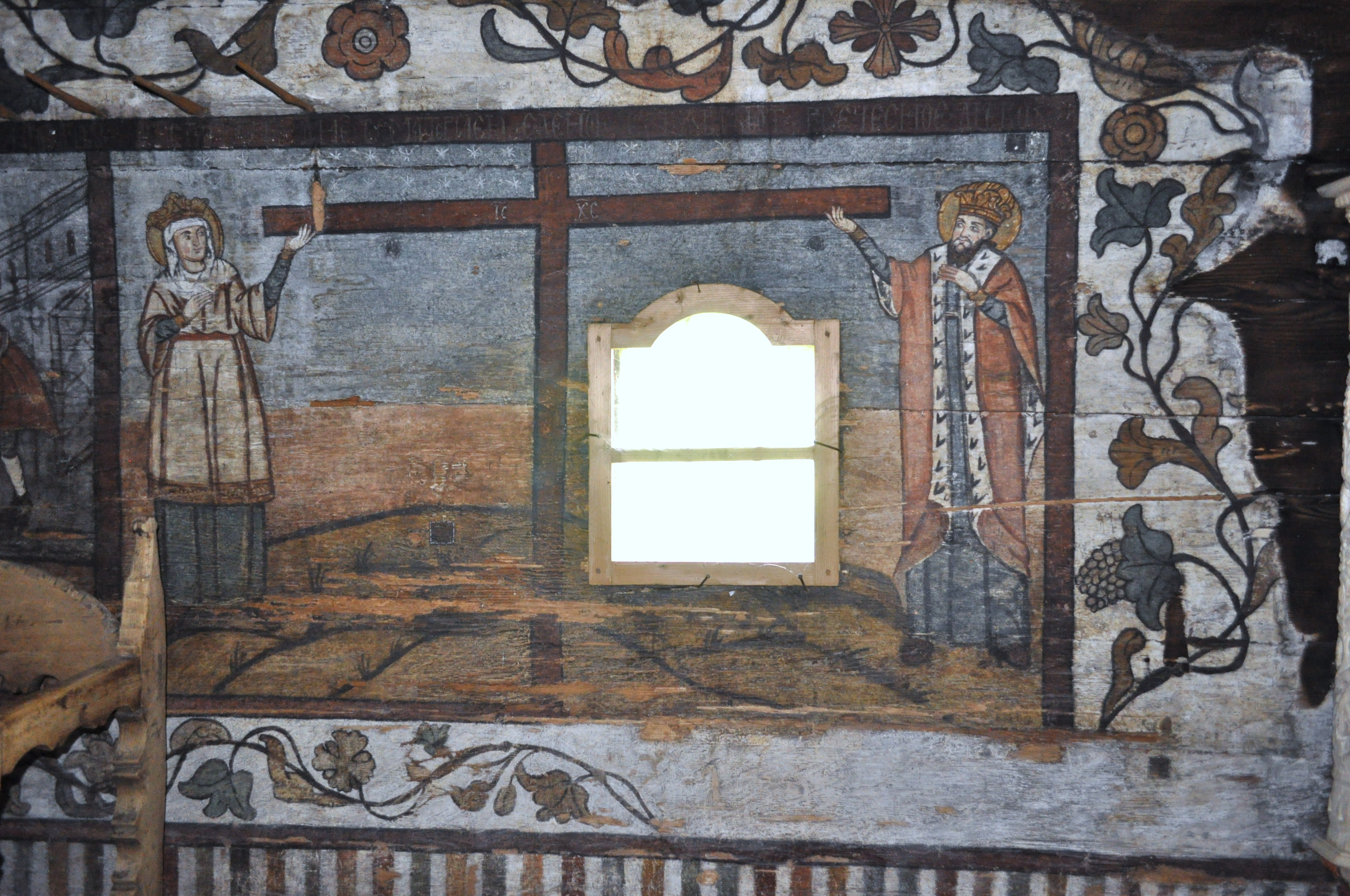 Biserica de lemn "Sfântul Nicolae", sat BOGDAN VODĂ